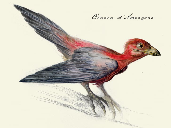 Capture d'écran du jeu vidéo Syberia (2002), développé et édité par Microïds. Dessin d'un coucou d'Amerzone par l'explorateur Alexandre Valembois. L'héroïne Kate Walker découvre ce document à la bibliothèque de l'université de Barockstadt pendant l'aventure.